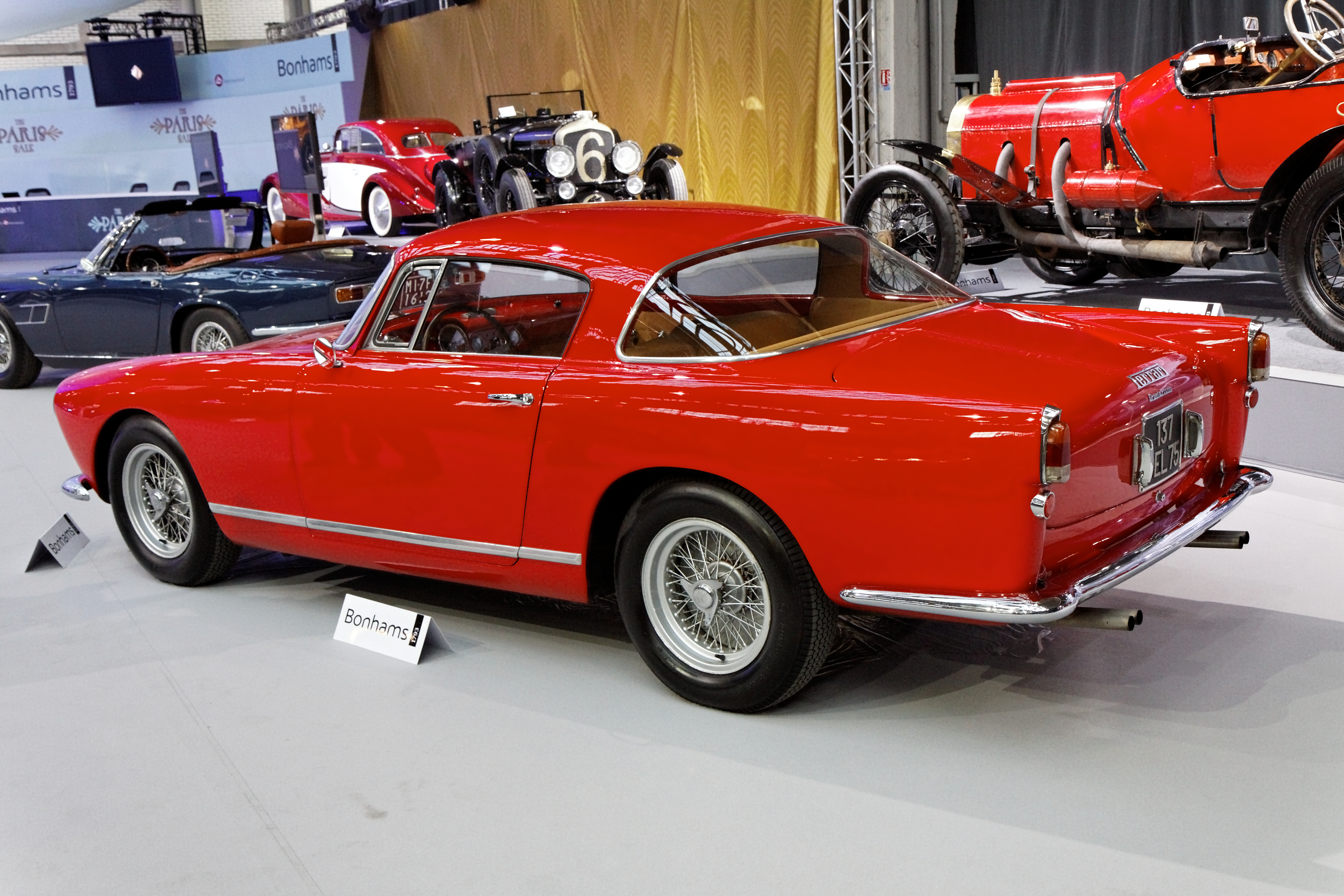 Ferrari 250GT Berlinetta